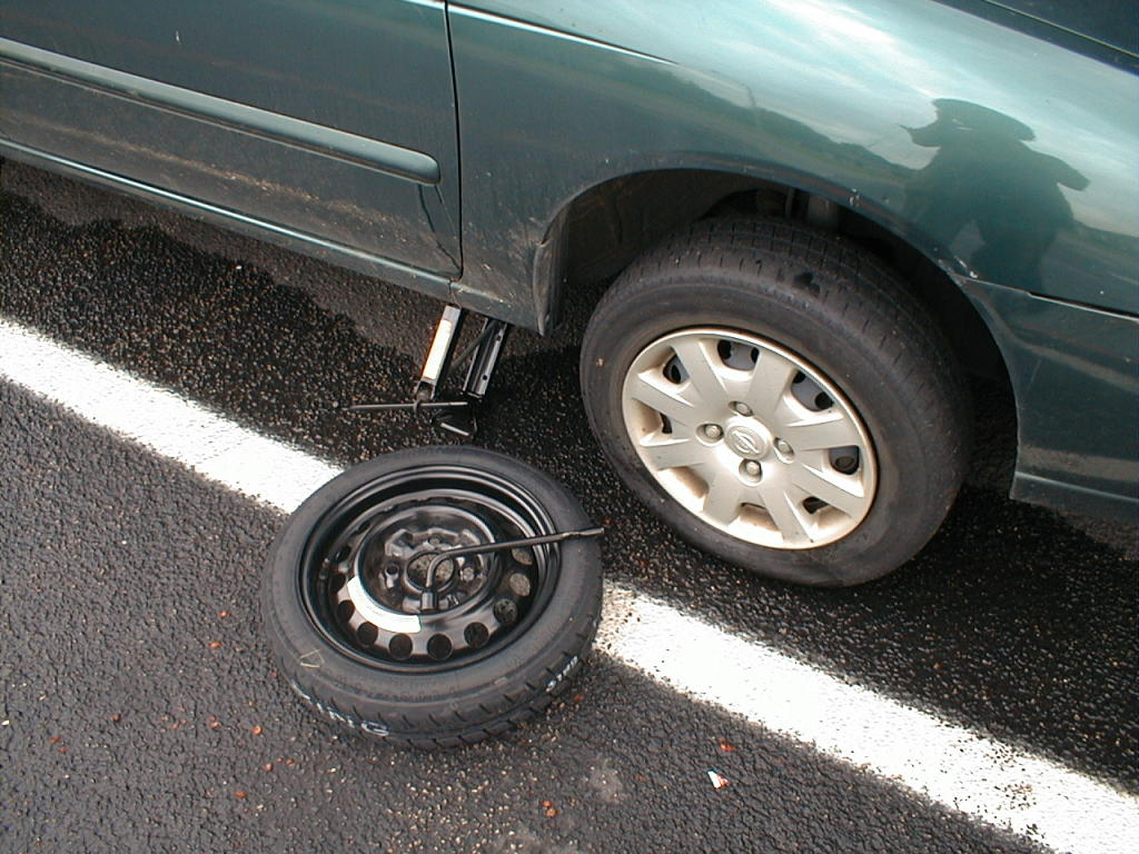 Changing tires